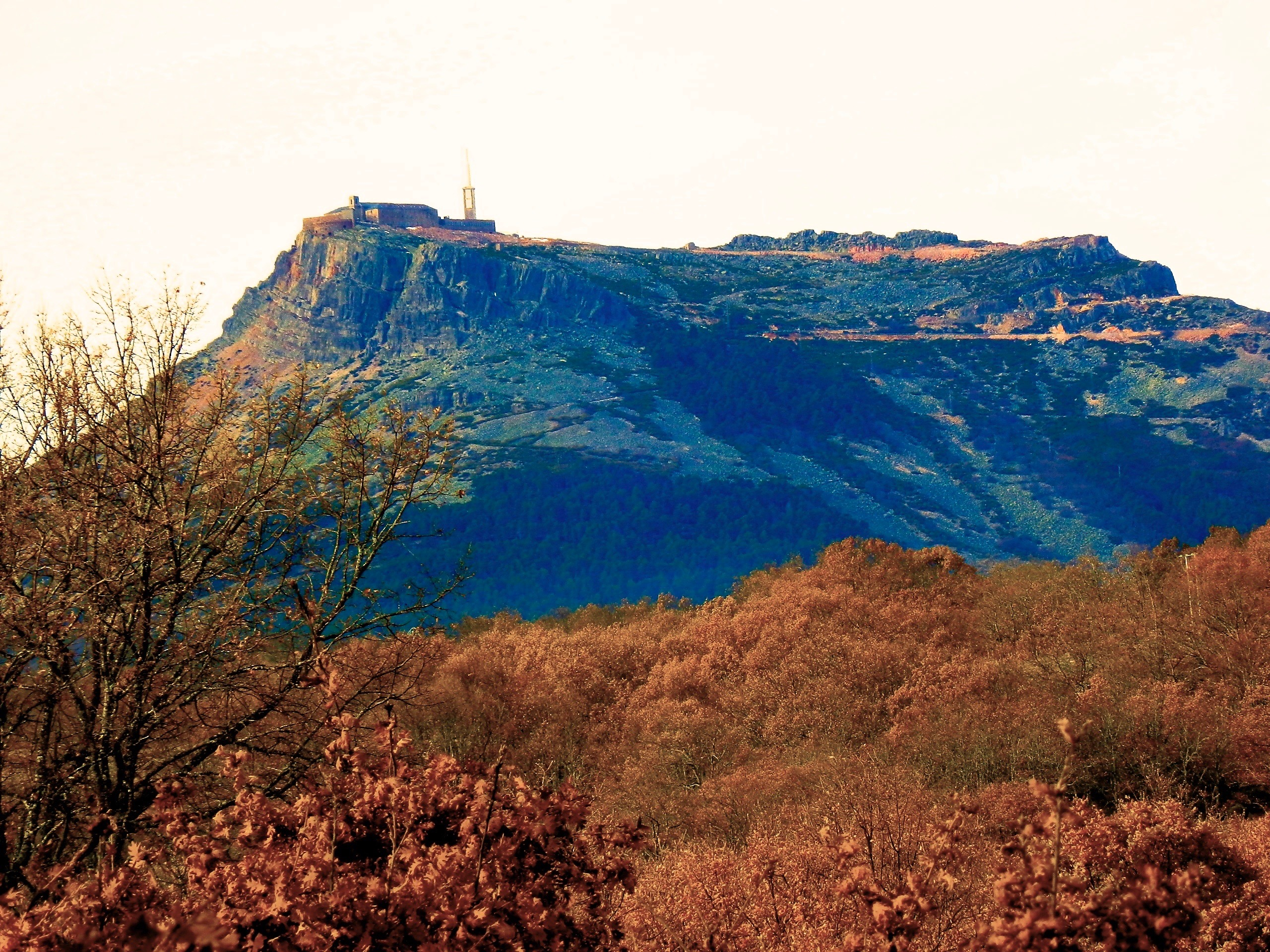 Peña de Francia